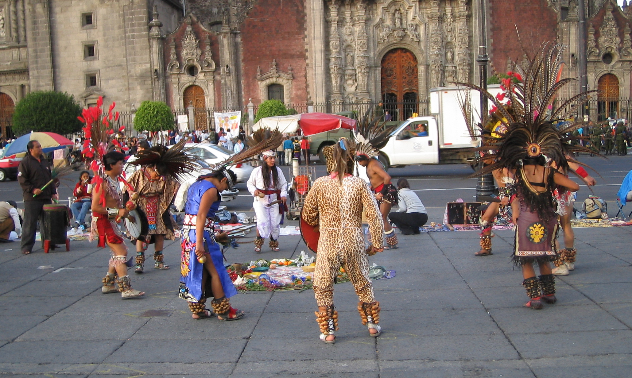 Indianische Tänze. Indio-Folklore in Mexiko.